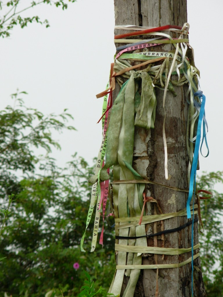 Cada fita é uma promessa, um desejo, uma cura.